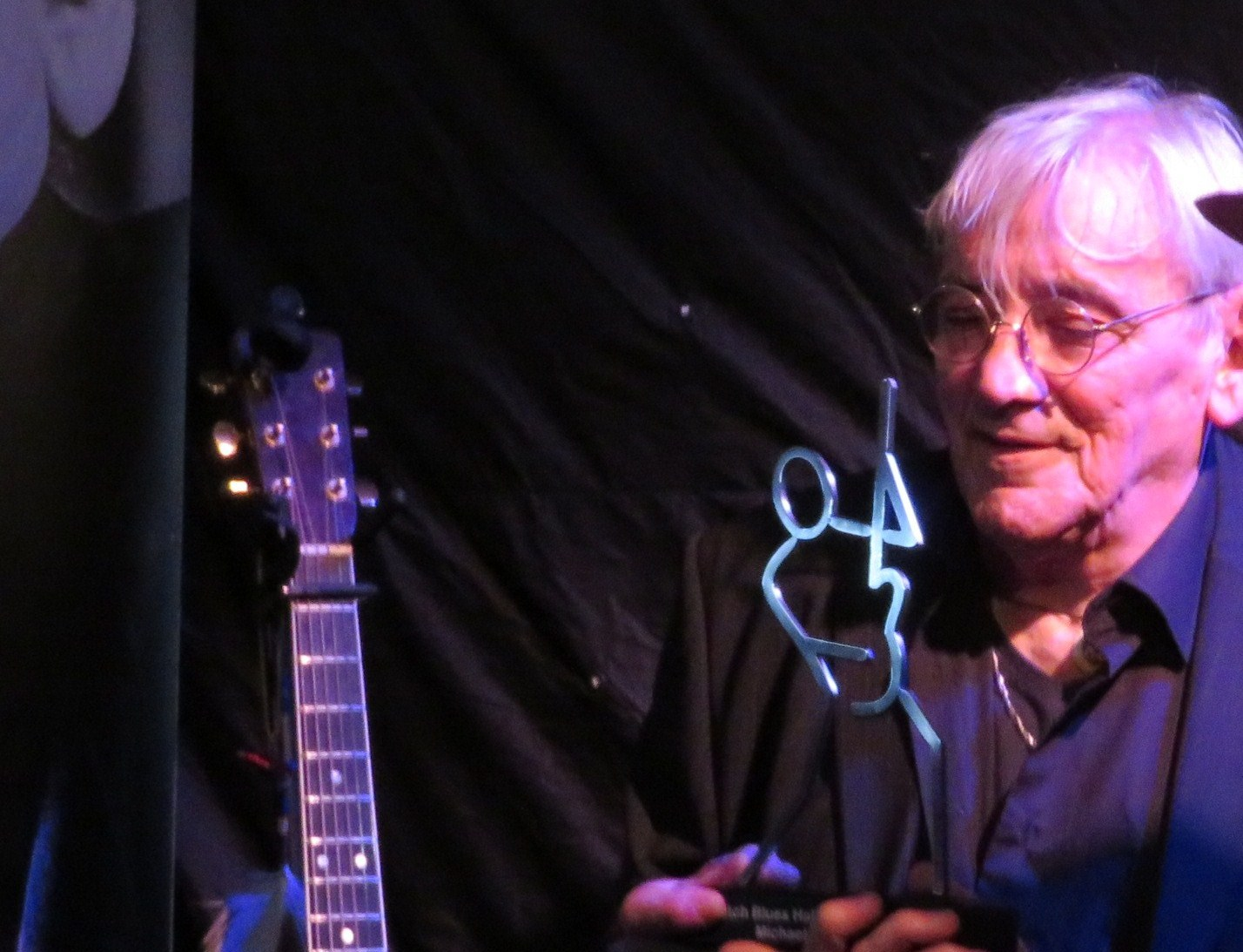 Singer/songwriter Michael de Jong tijdens een concert in Wijk bij Duurstede, waar hij de Dutch Blues Hall of Fame Award ontving op 16 juni 2017.